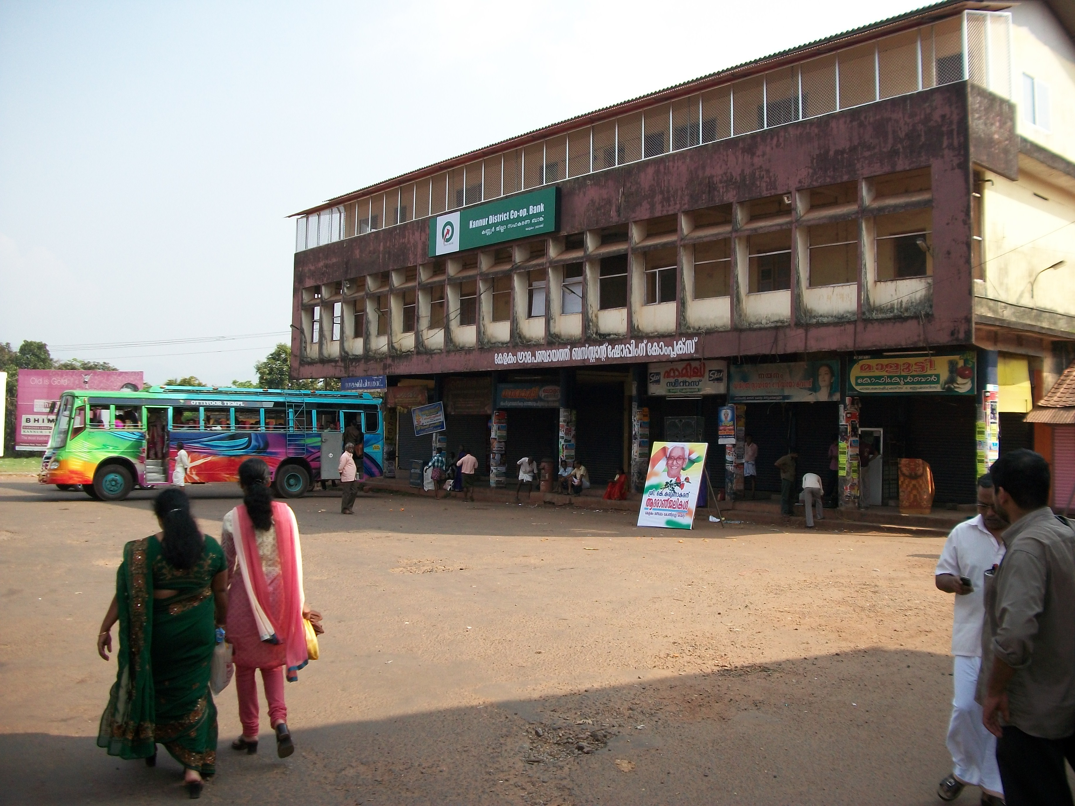 കേളകം ബസ് സ്റ്റാൻറ്